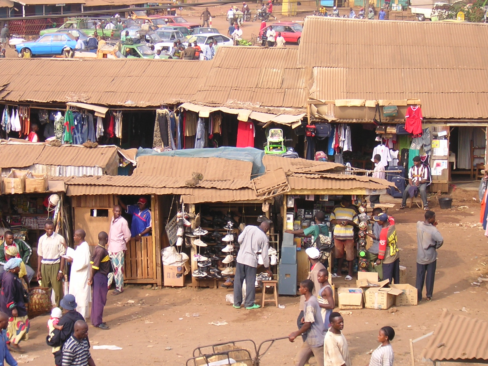 Une vue du marché de la ville de Mélong, dans la province du Littoral (Cameroun)